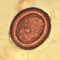 Uovo di tenia